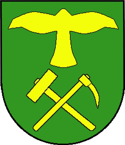 Znak obce Kanice